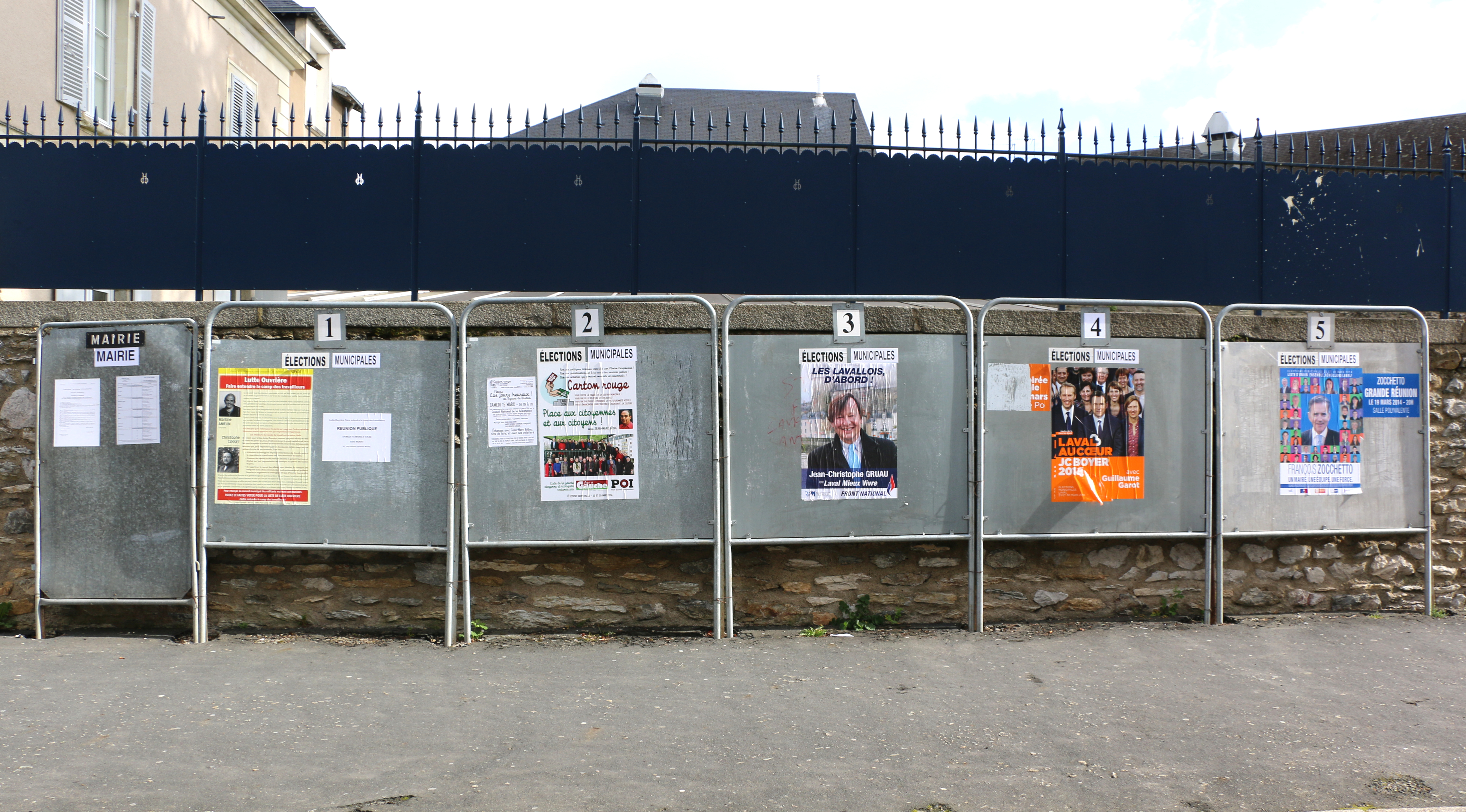 Affiches des candidats pour les élections municipales 2014 à Laval.